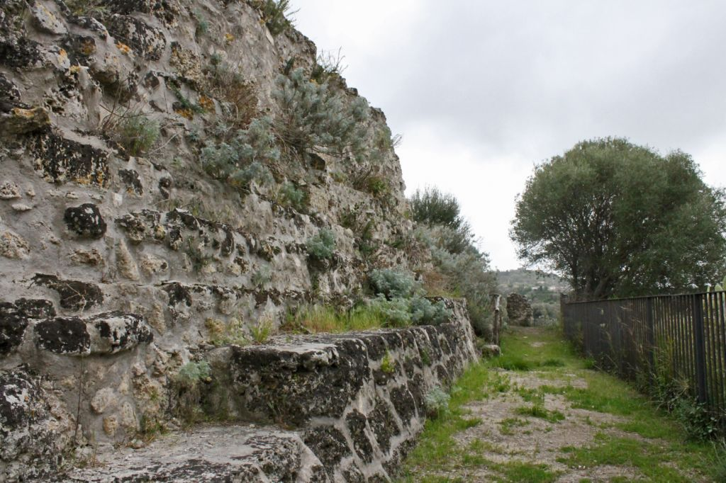 Poco distante dal centro abitato possiamo ammirare i ruderi del castellaccio( castrum vetus), costruito seguendo in qualche modo il disegno della sommità piatta della rupe su cui poggia. Le prime informazioni riguardanti il castello medievale risalgono all'epoca normanna.